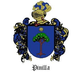 blason del apellido pinilla